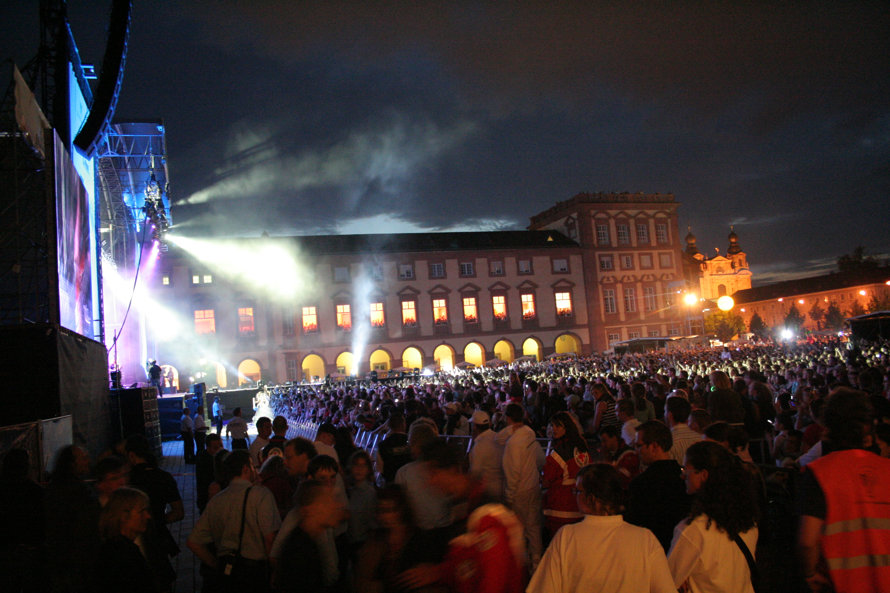 Menschenmenge vor der Bühne bei der Arena of Pop 2007 im Mannheimer Schloss - Nr. 001 Crowd in front of the Stage at the "Arena Of Pop" 2007 on Mannheim Castle - No. 001